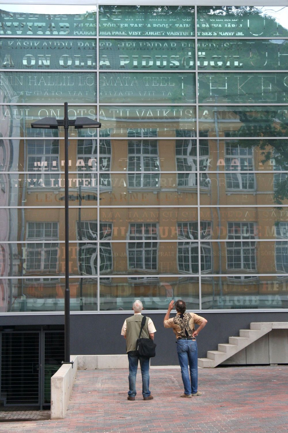 Tartu linna päev 2013.